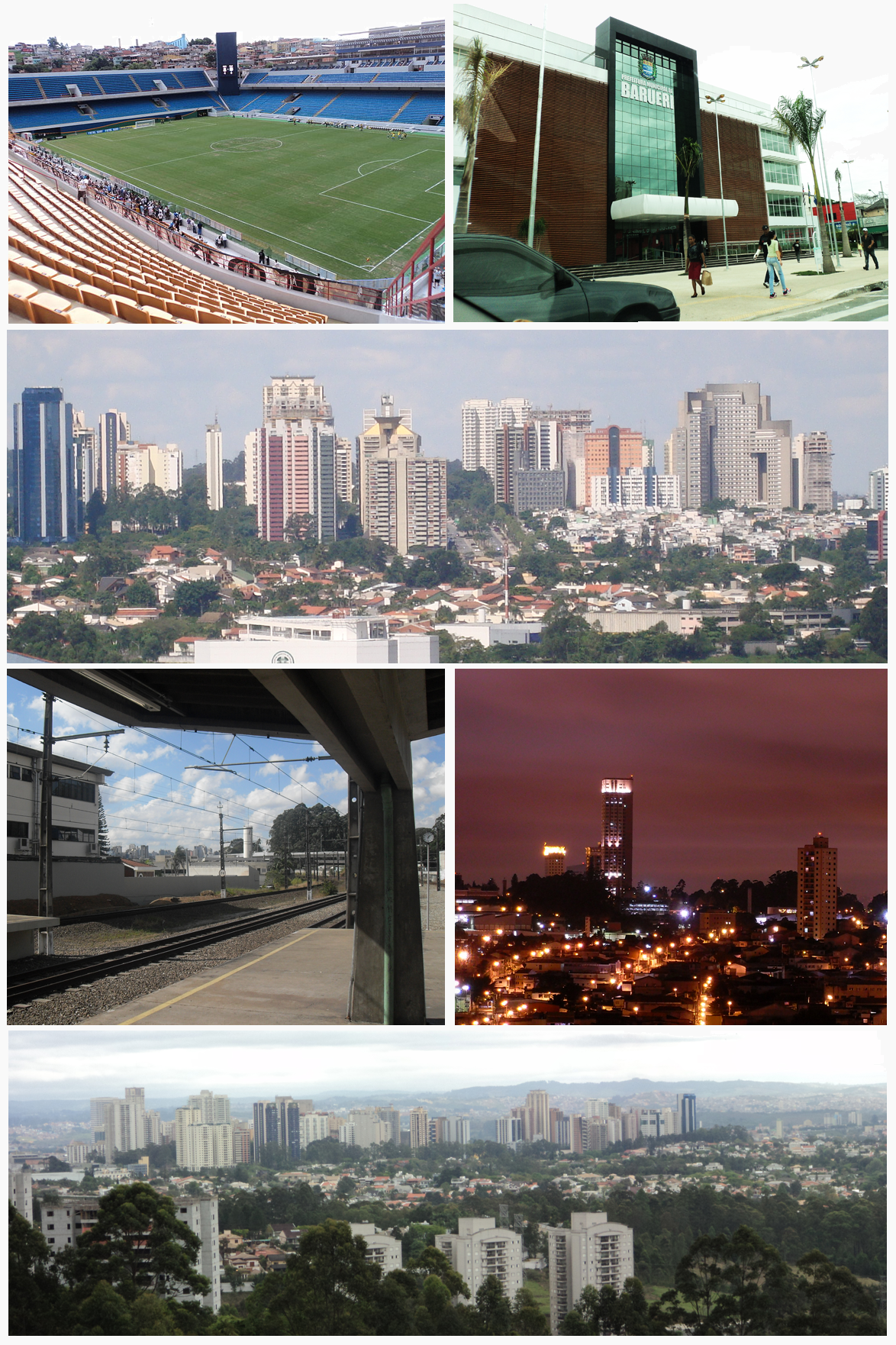 Montagem com fotografias de Barueri